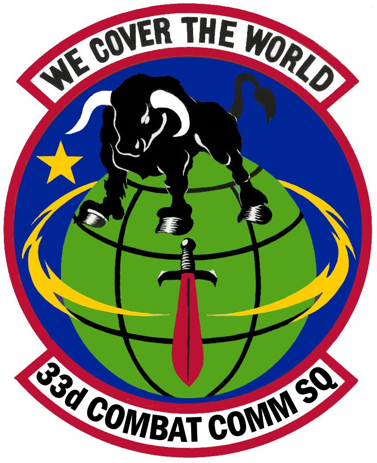 31st_Combat_Communications_Squadron